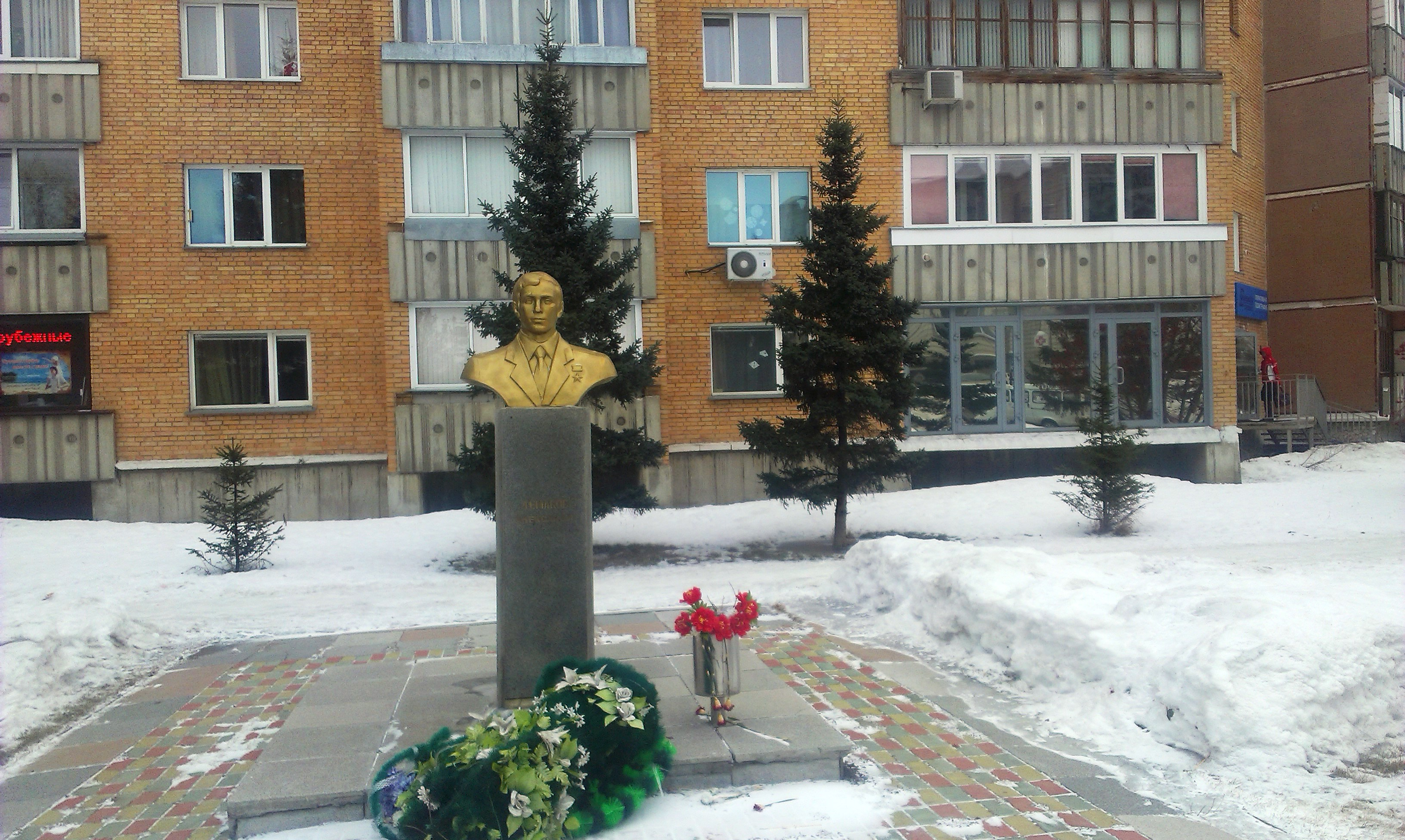 Улица Демакова